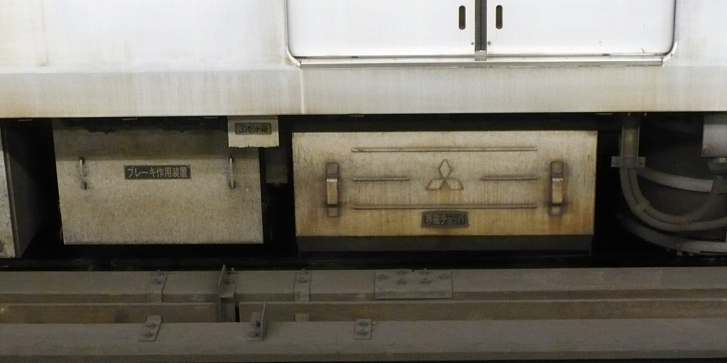 01系の界磁チョッパ装置